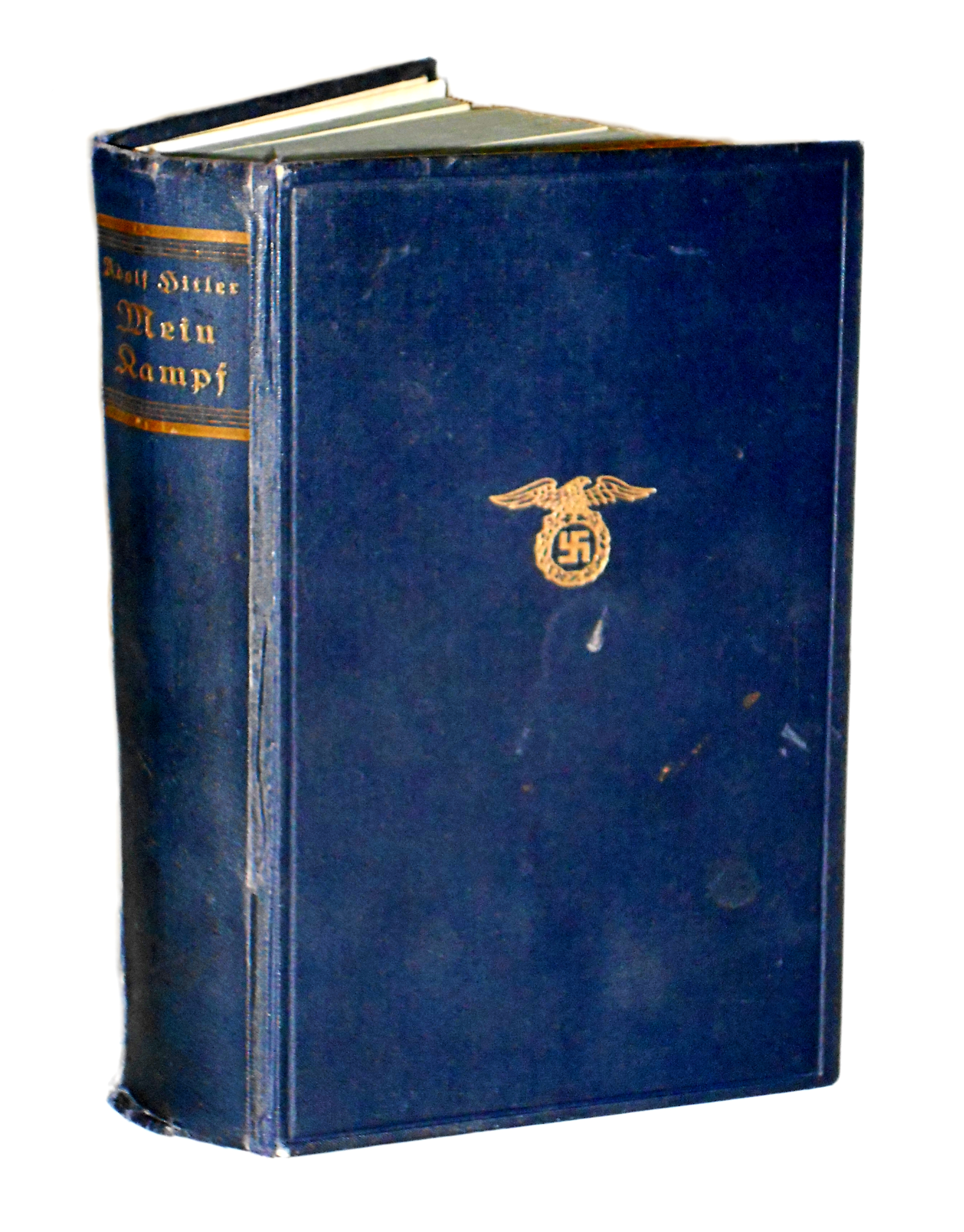 Mein Kampf, 9. Auflage, 95. - 104. Tausend, München 1932